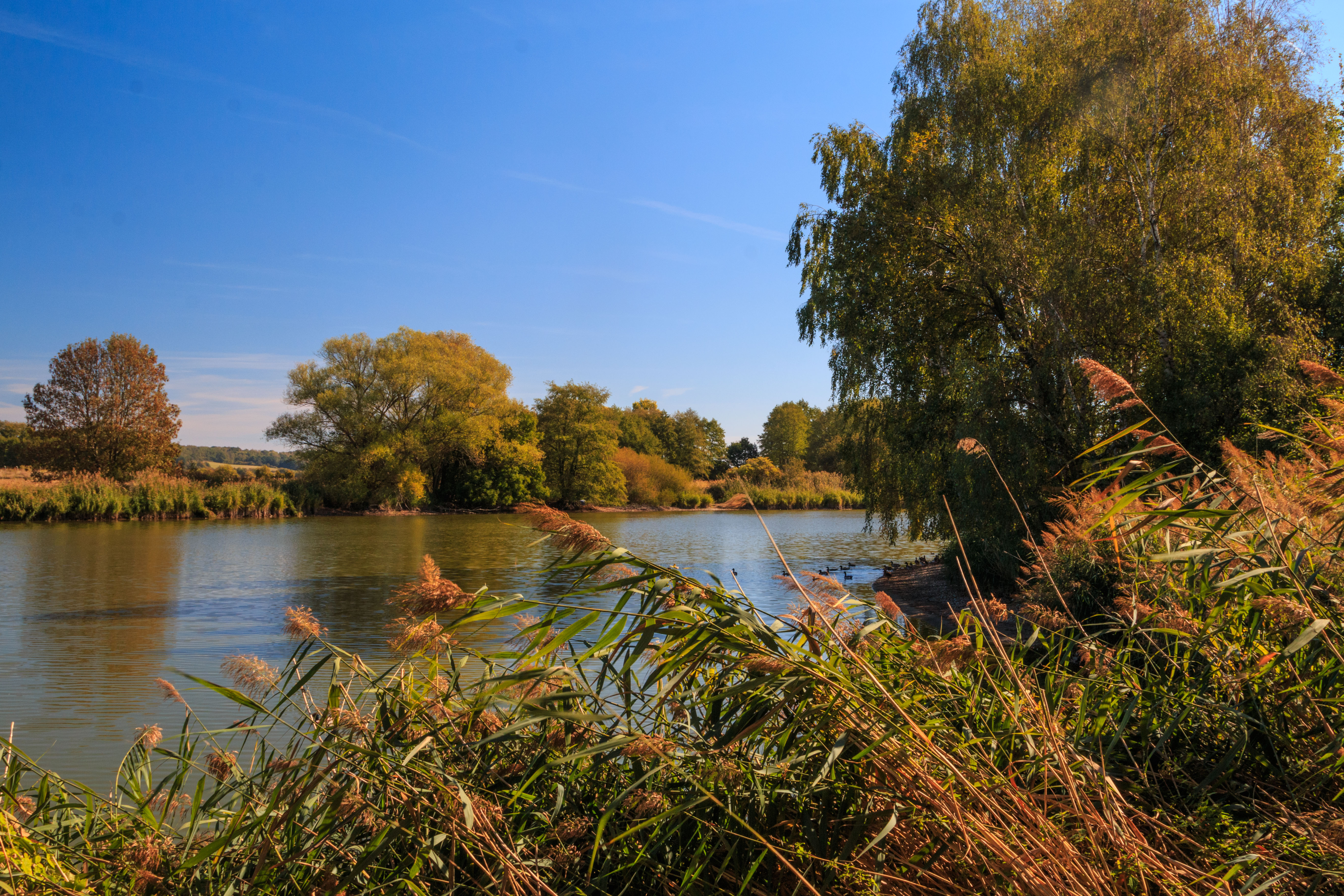 Rybník Hoření Střípek Project: Vodstvo.